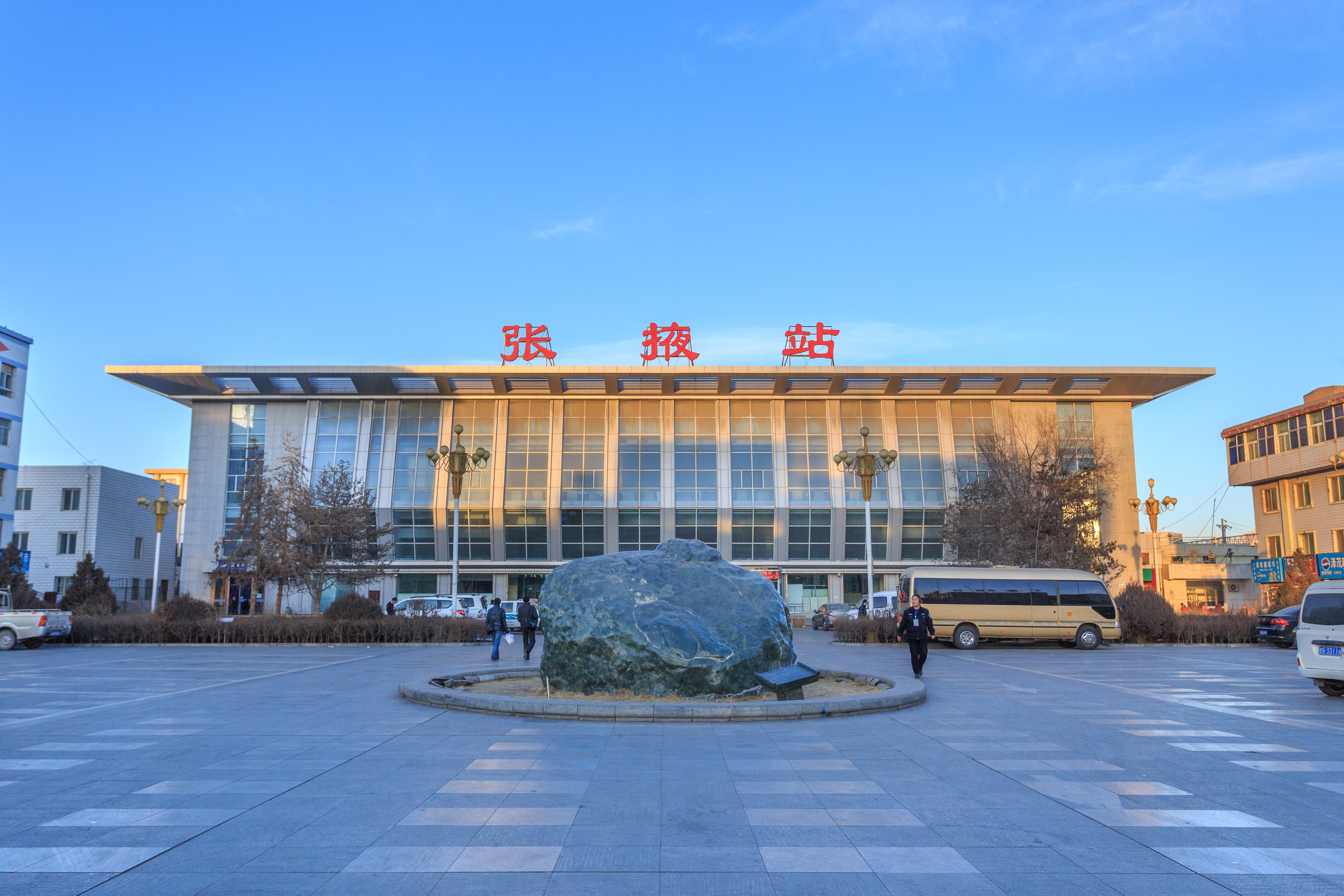 张掖火车站